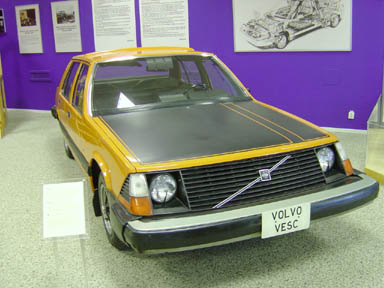 Volvo VESC concept car from 1972. Photo by Användare:Mangan2002 (radera) (nuvarande) 16 augusti 2004 kl.10.58 . . Mangan2002 (Diskussion) . . 384x288 (26301 bytes) (Volvo VESC, säkerhetsbil, konceptbil, 1972)